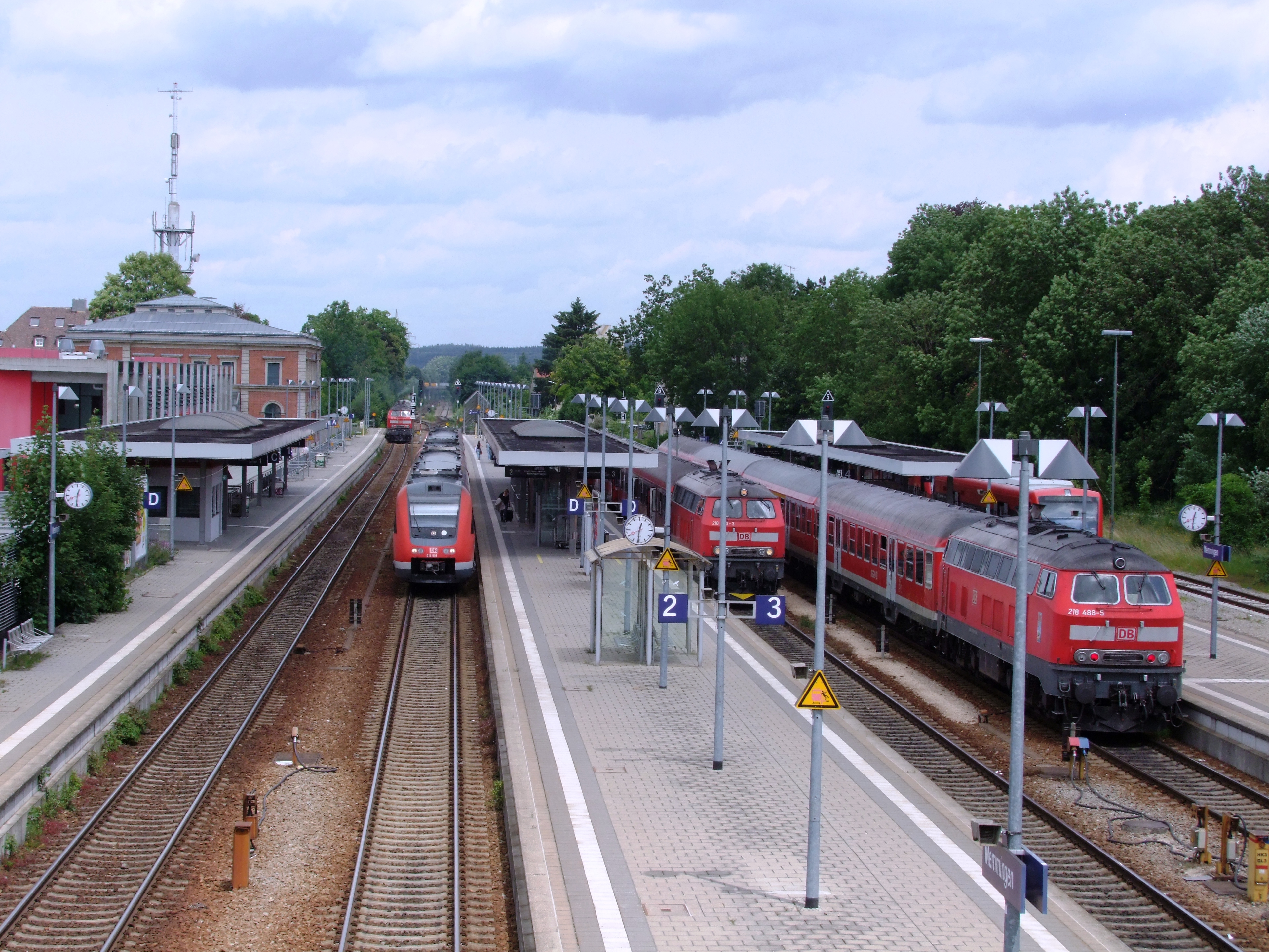 Oberschwäbisches Memmingen Bahnhof vom "Eisernern Steg" aus fotografiert.